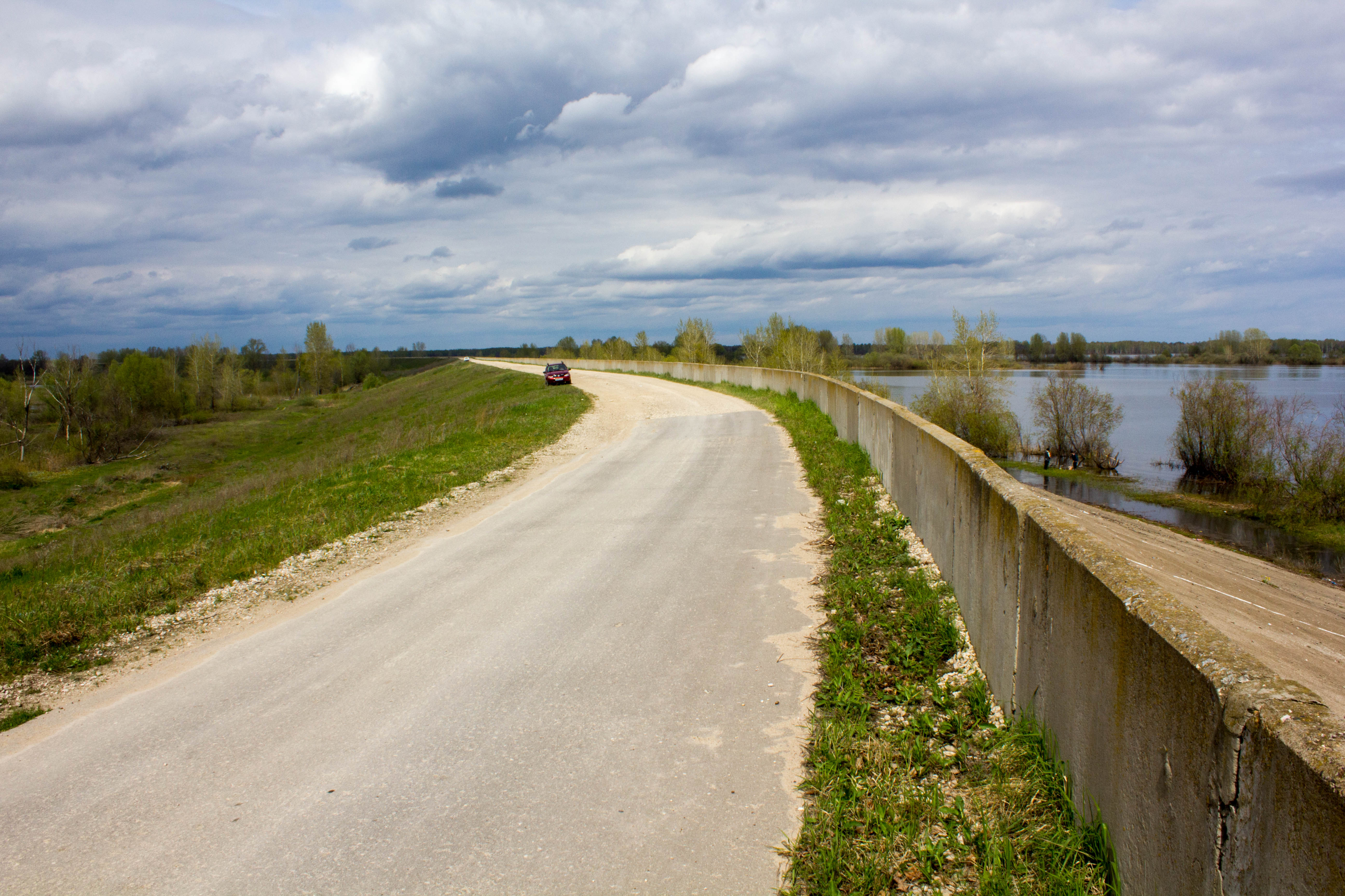 Дорога по дамбе. Начало асфальта